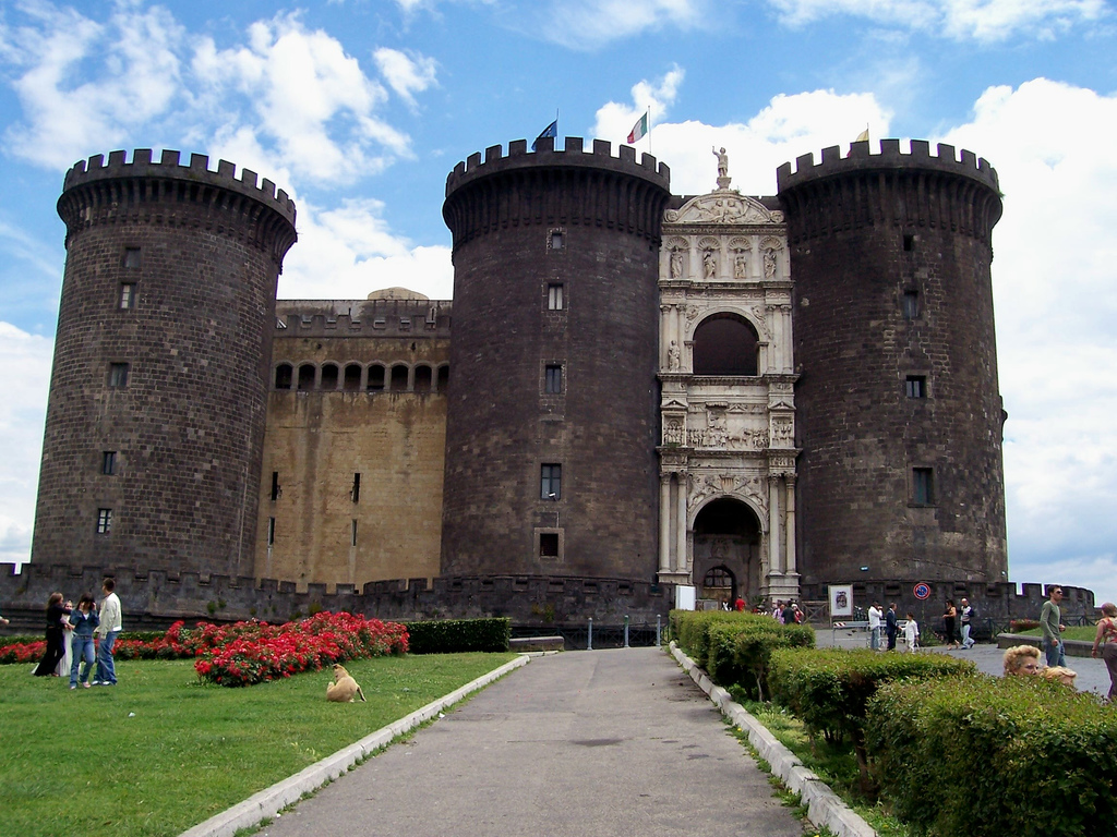 Maschio Angioino (Castel Nuovo). Napoli.